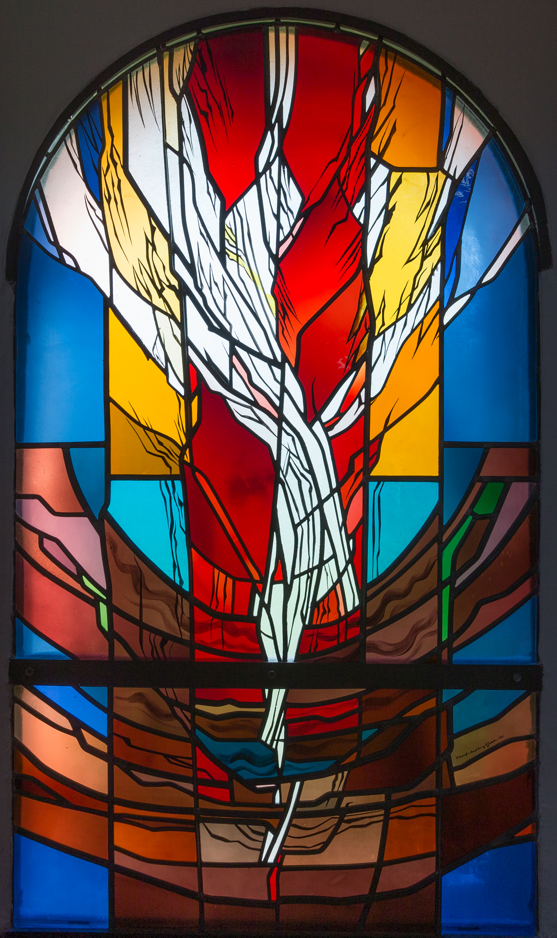 Evangelische Kirche Oberndorf, Solms, Lahn-Dill-Kreis, Hessen, Deutschland